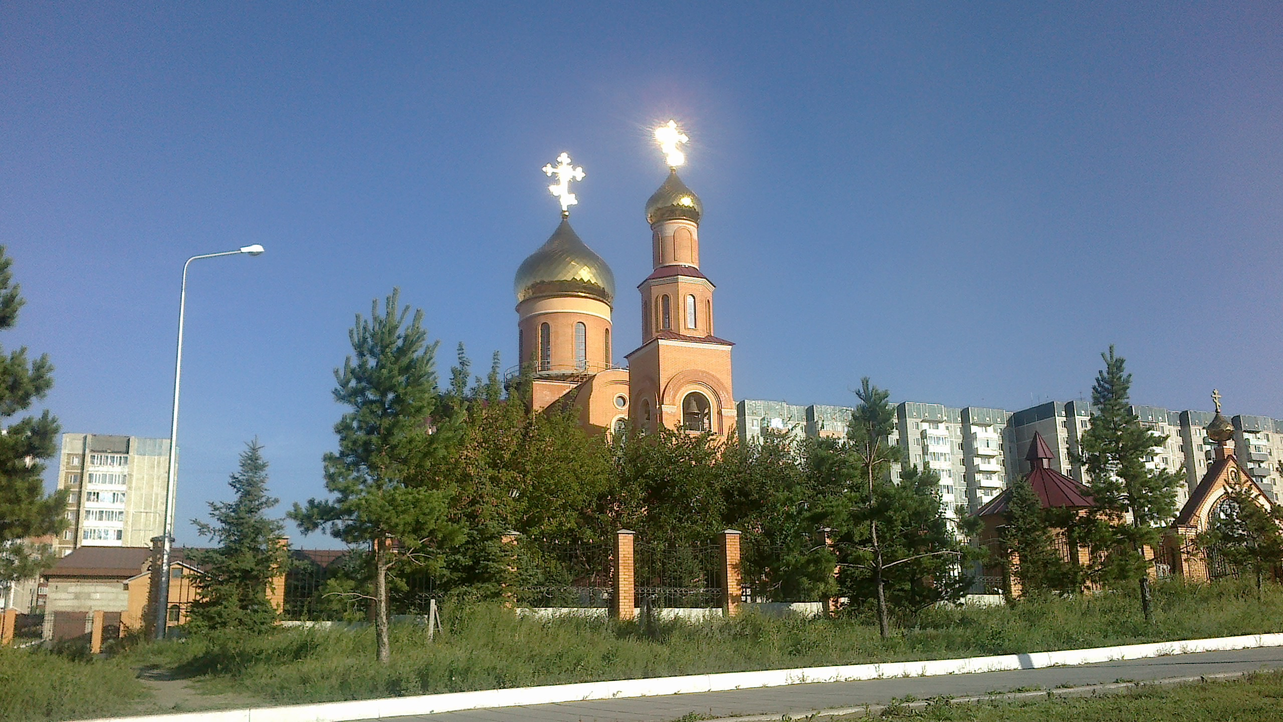 Microdistrict 9, Temirtau 100000, Kazakhstan